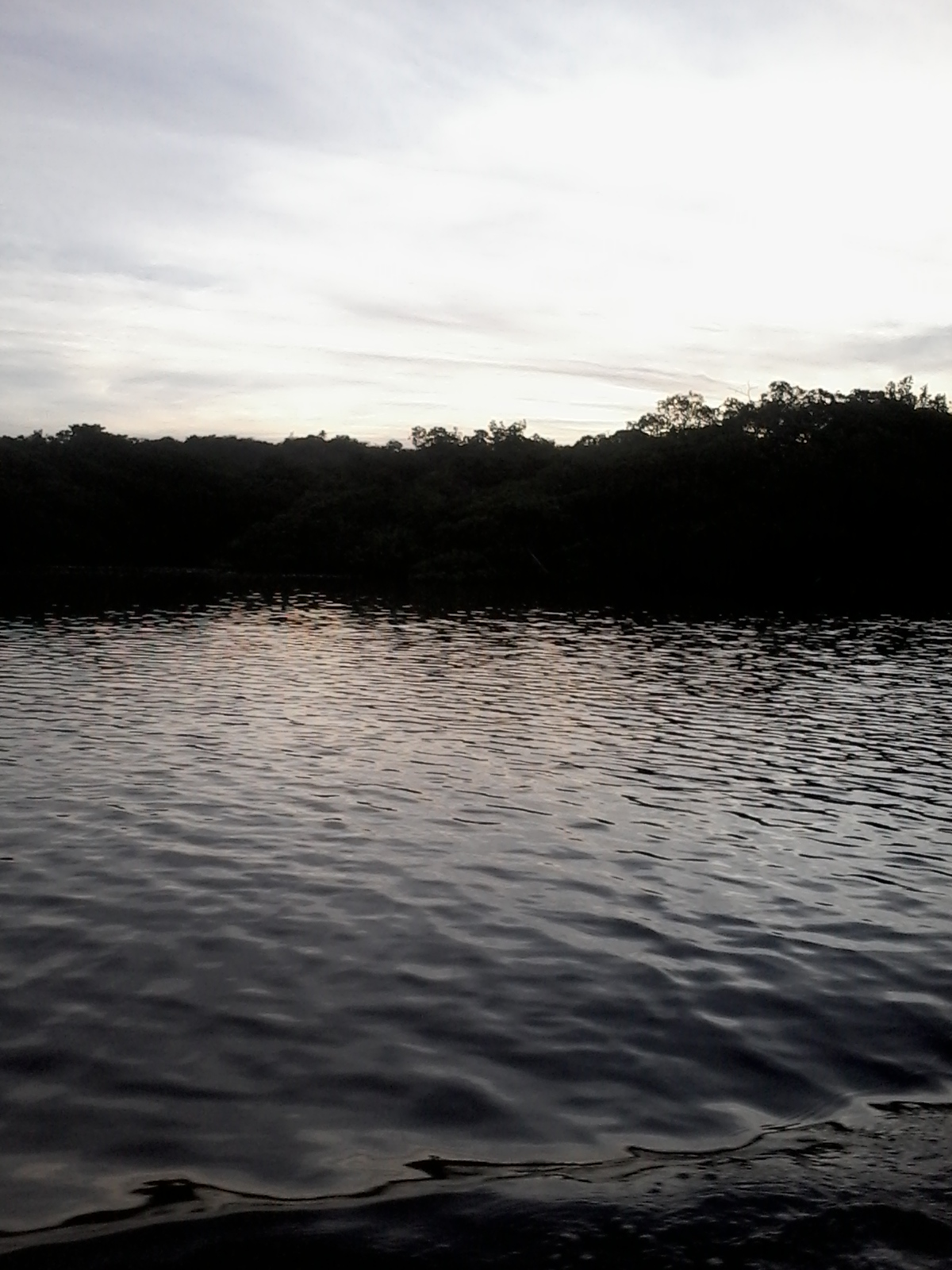 passeio sobre as Águas da maré